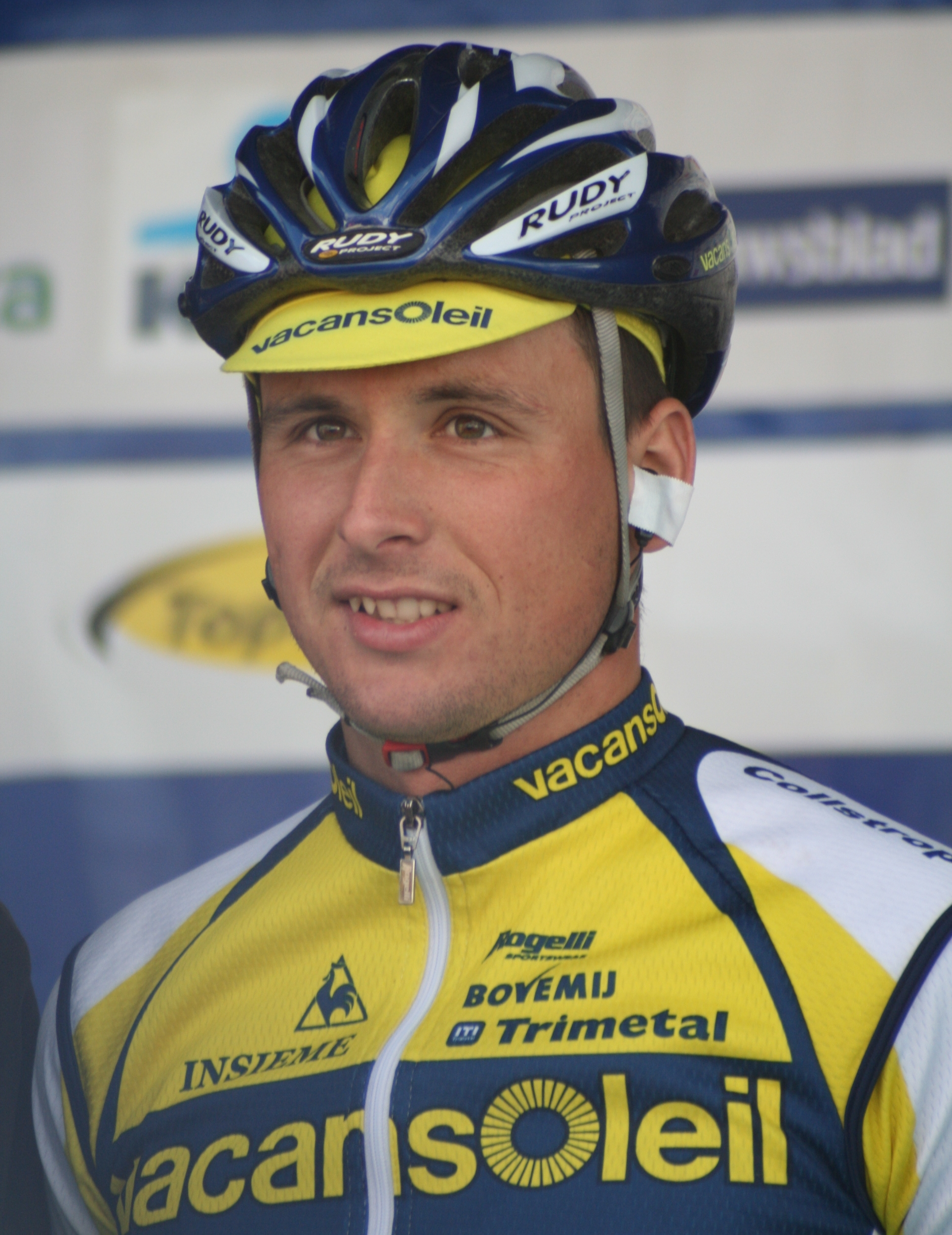 Johnny Hoogerland au Grand Prix E3 2009